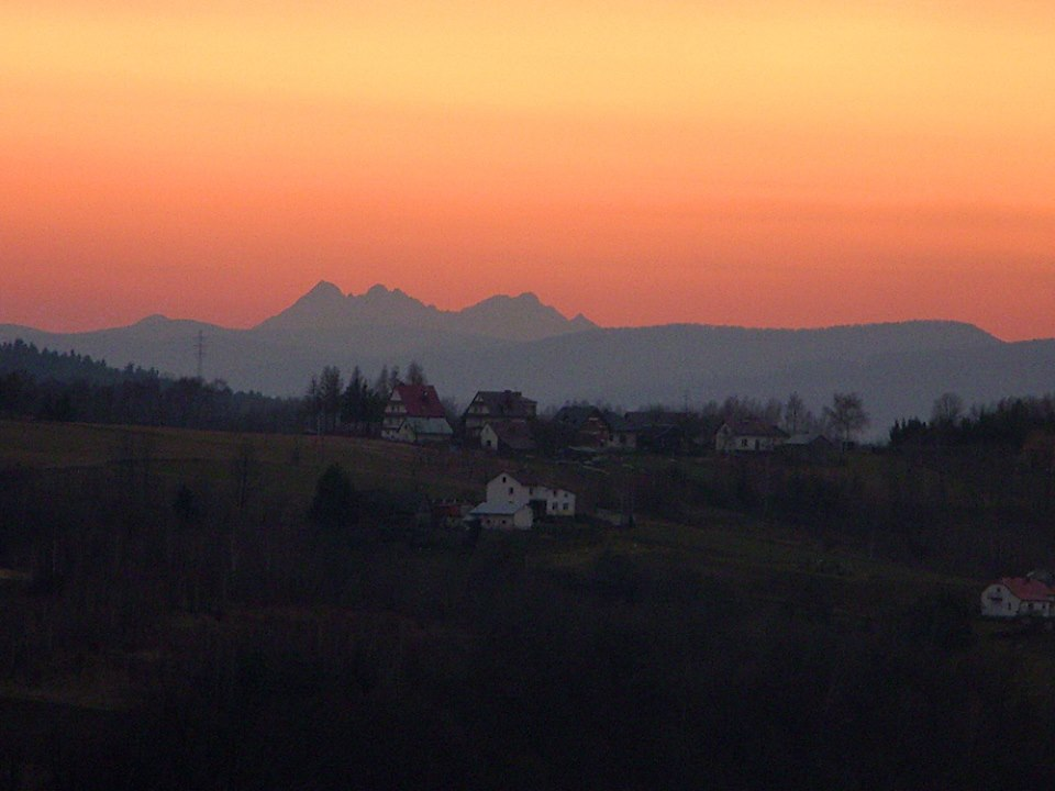 Tatry z południowego stoku góry Babis